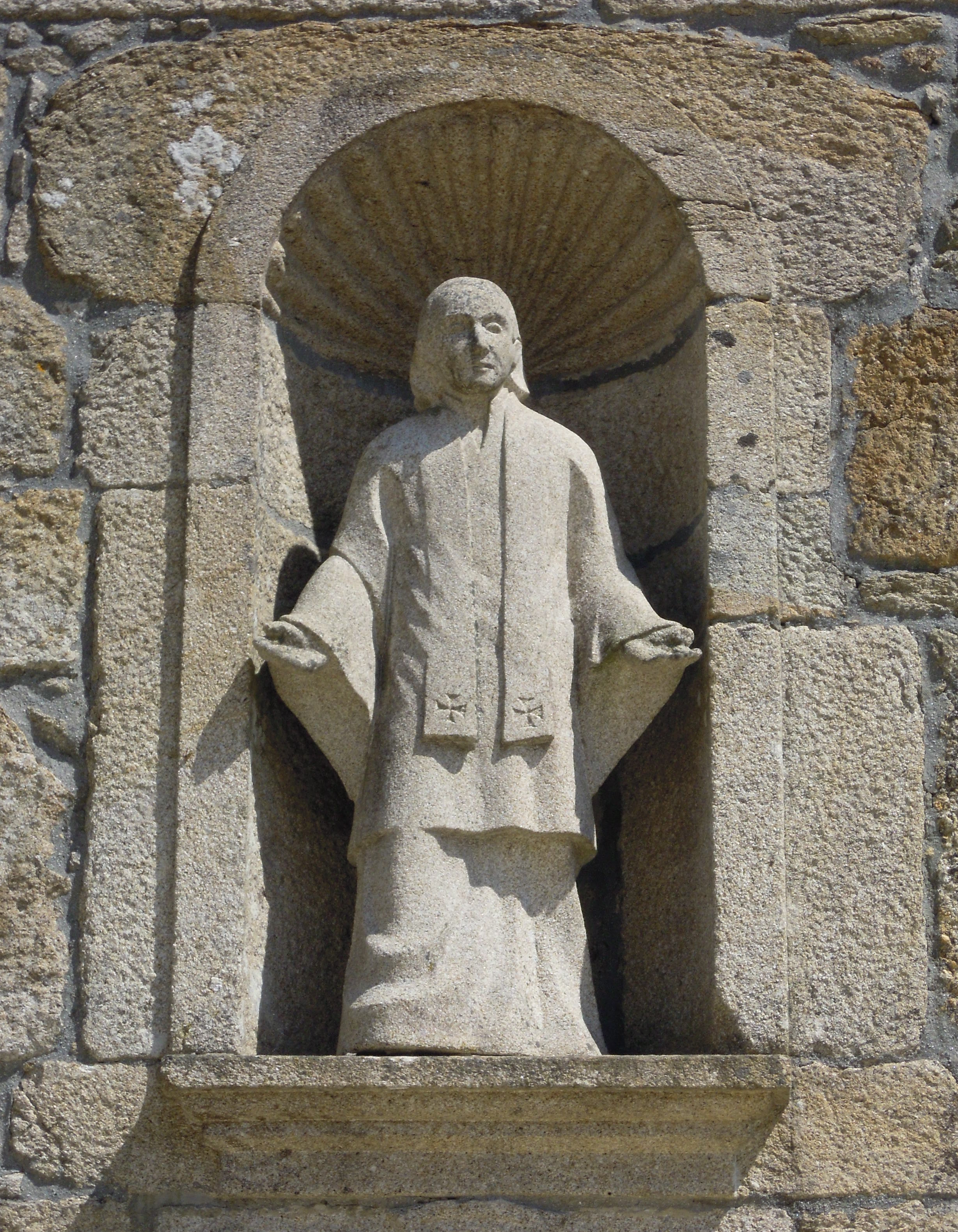 Imaxe de san Caetano na igrexa de Quintela (Crecente)